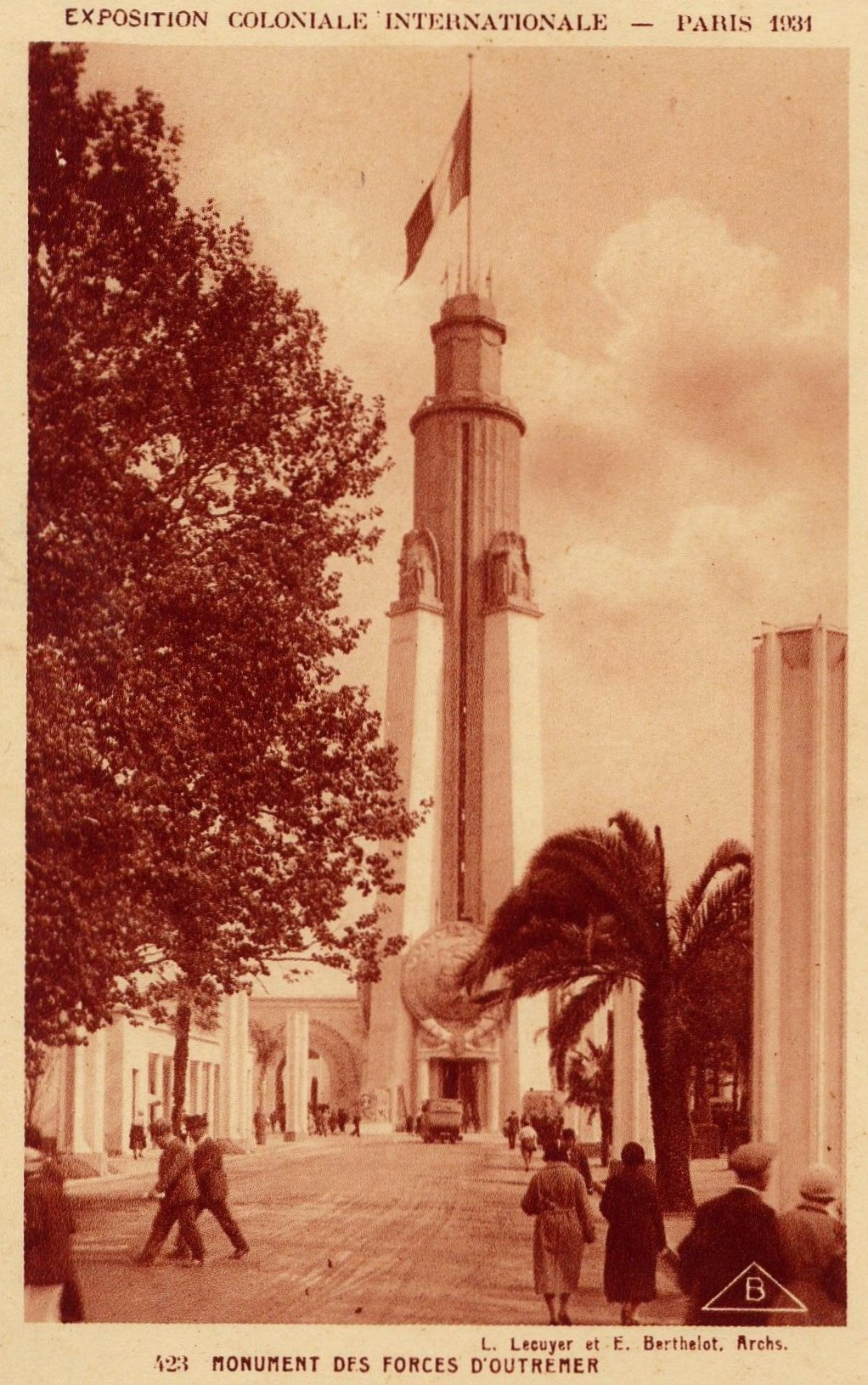 Pavillon des Forces d'Outremer à l'Exposition Coloniale de PARIS en 1931